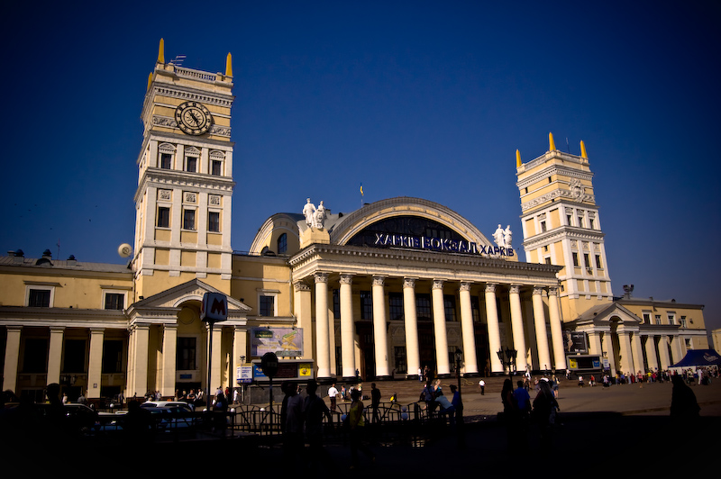 Kharkov (Ukraine) RailRoad Station ??????????? ?/? ??????